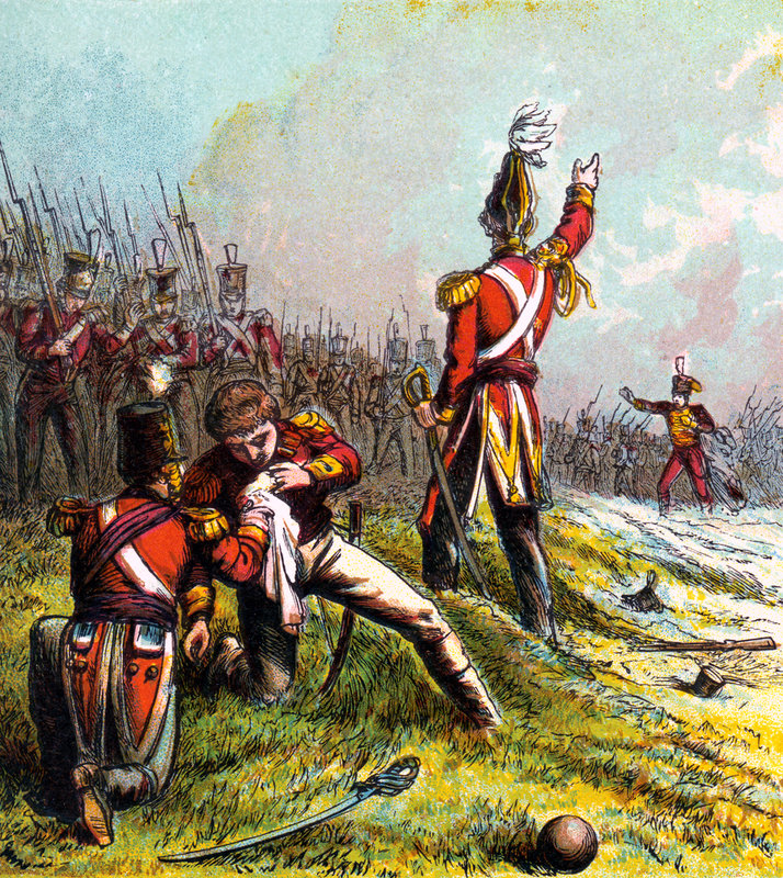 Mort du général John Moore à la bataille de la Corogne, 1809.